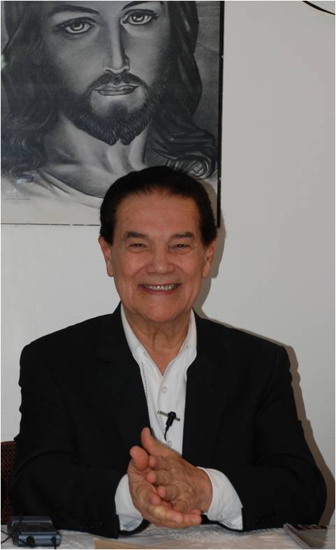 Divaldo Pereira Franco, médium brésilien, lors d'une conférence à Orly